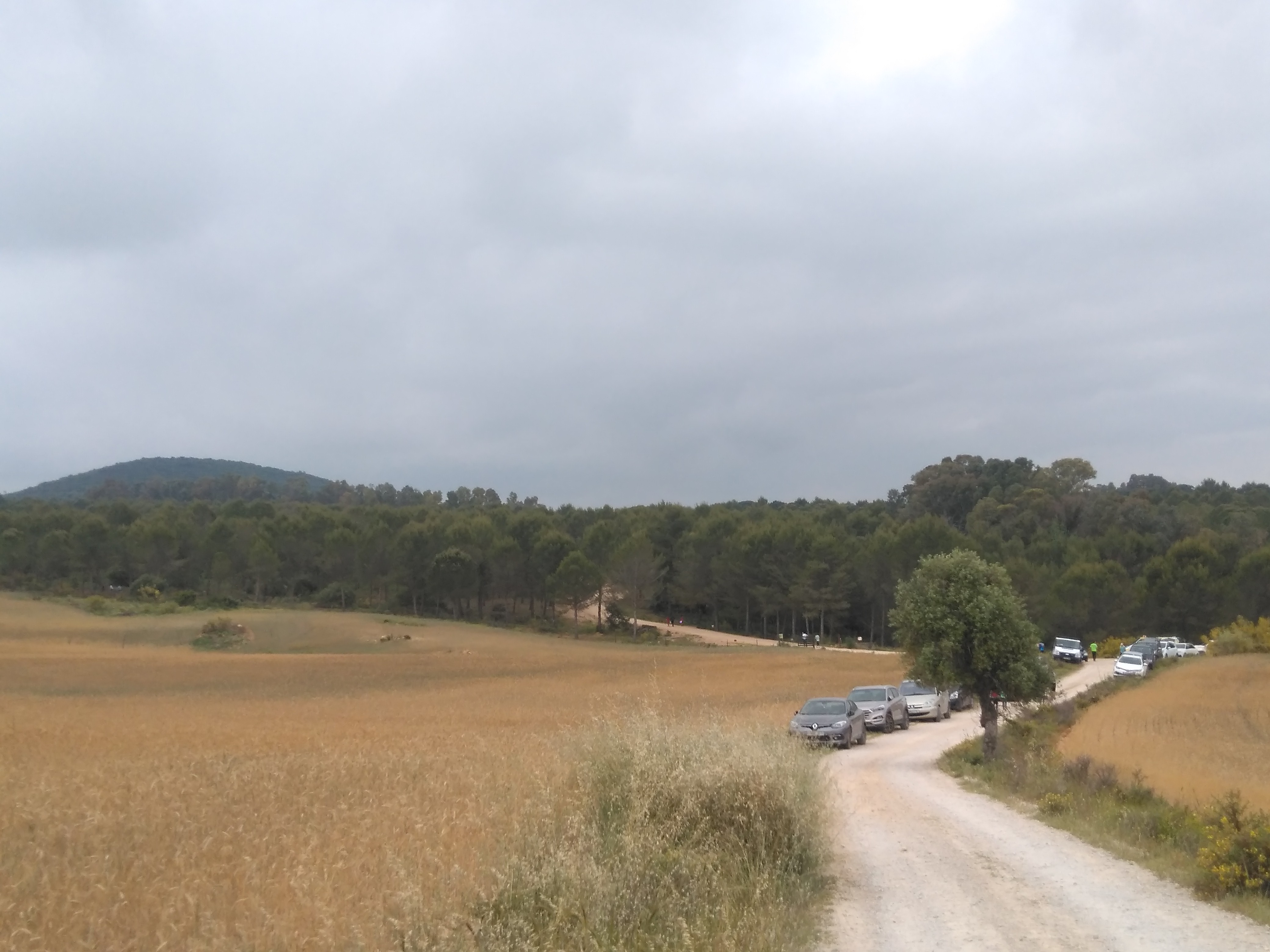 Cortijo La Morla en Arcos de la Frontera (España)